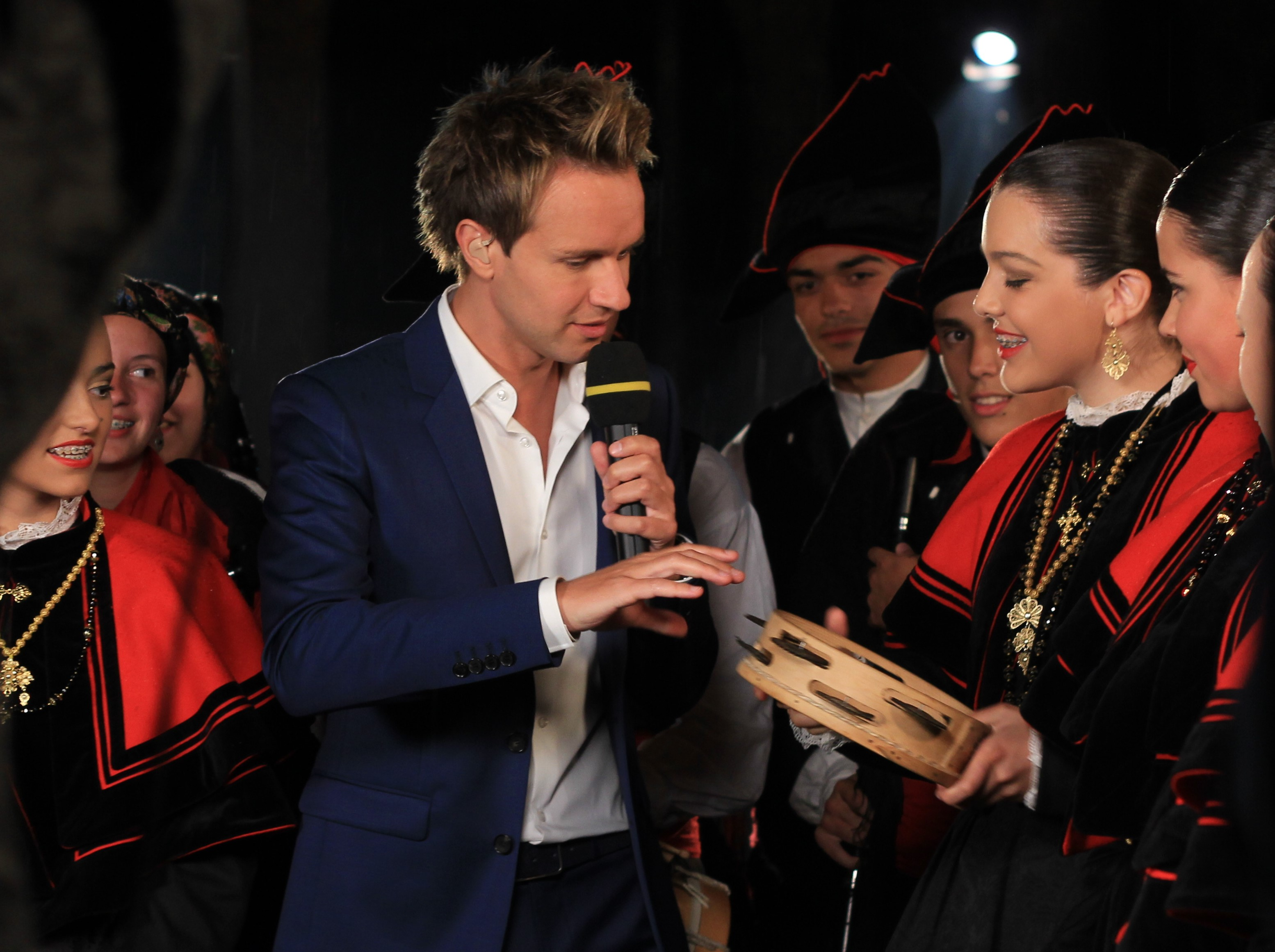 Enregistrement des nuits magiques du FIL 2018 au stade du Moustoir, avec Cyril Féraud